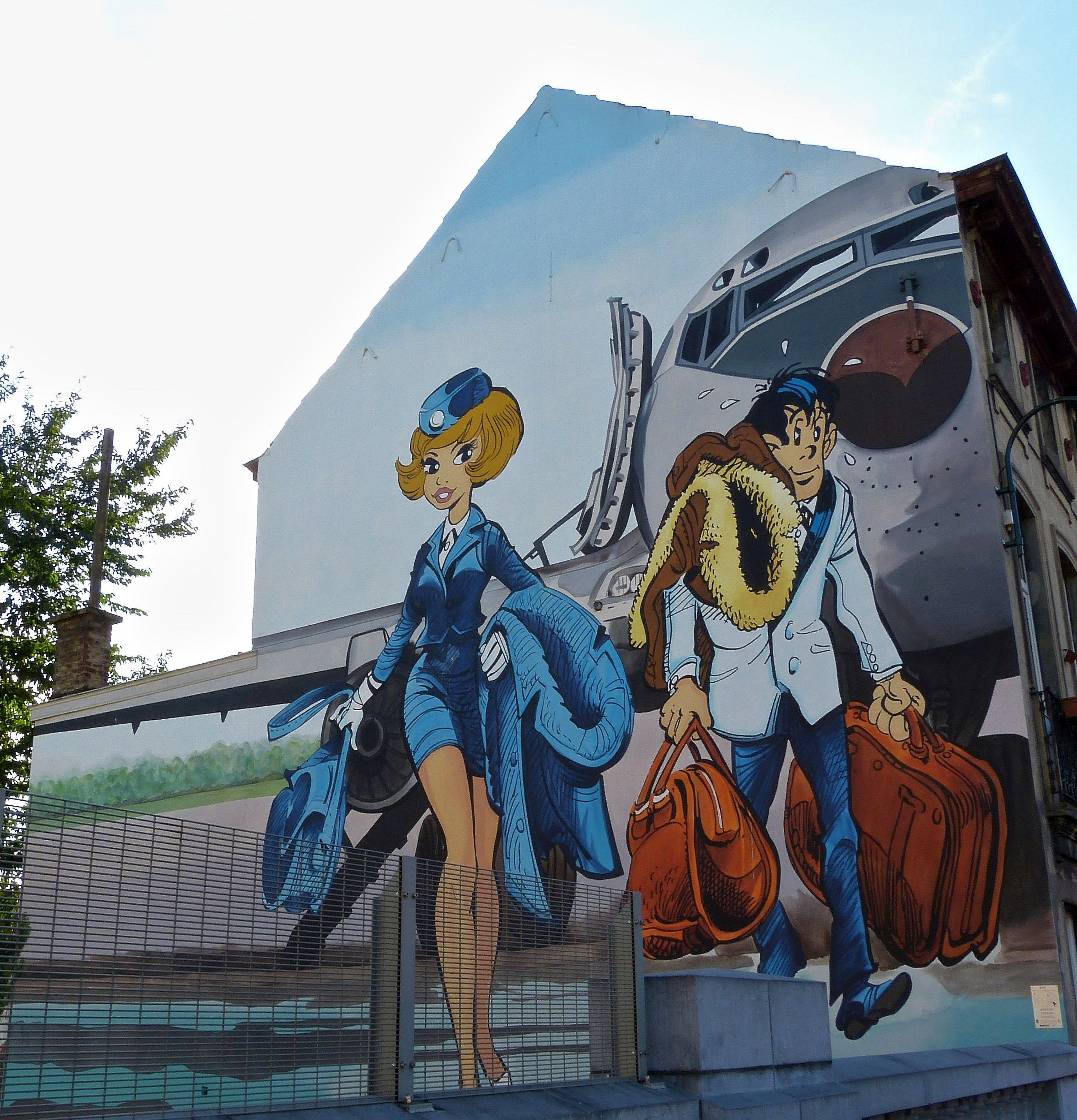 Stripmuur Natasja te Laken (Brussel)